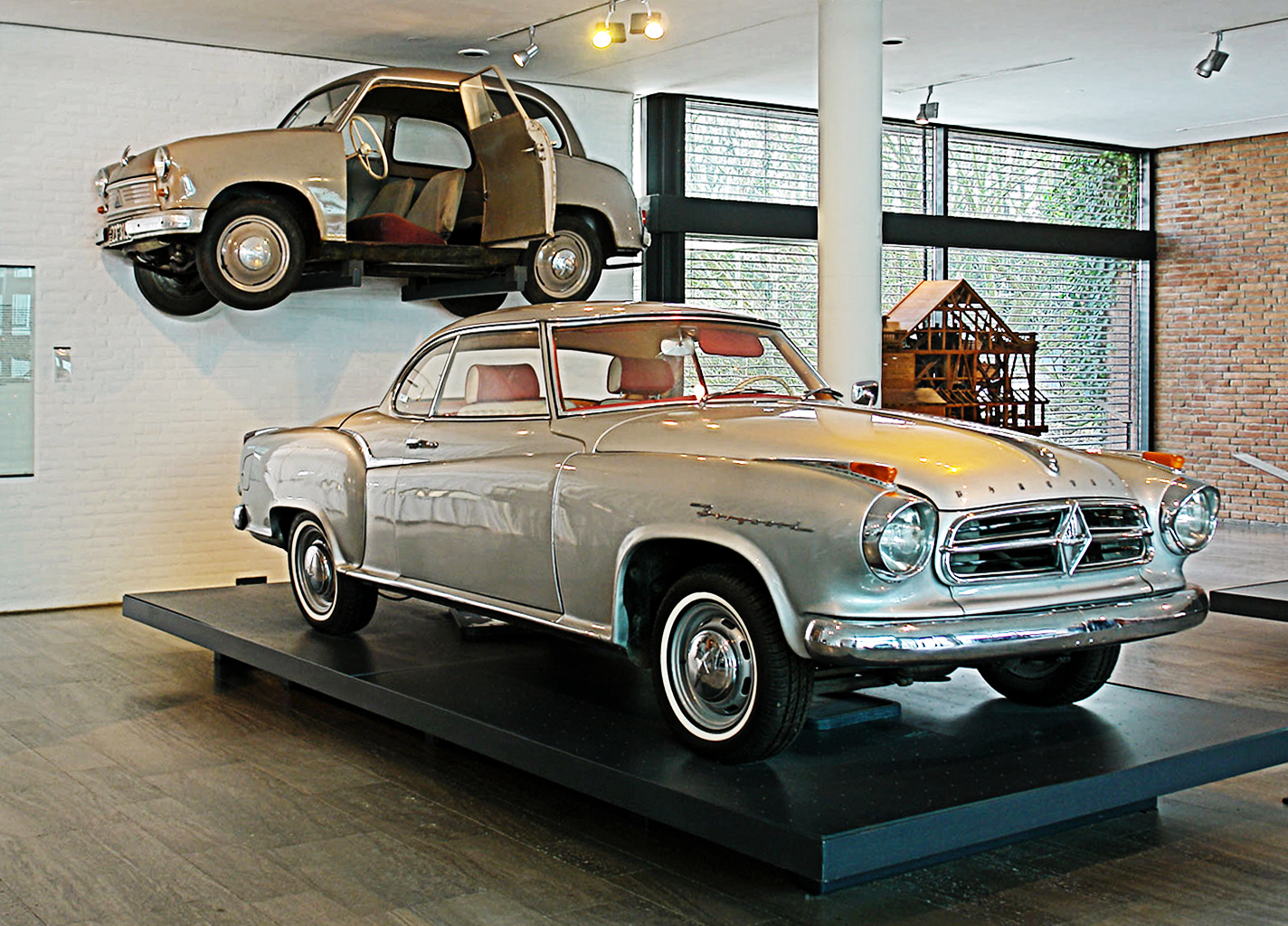 Focke-Museum Bremen: Borgward Isabella TS Coupé Bj. 1960 und Lloyd LP 400 Bj. 1953 Focke Museum Native nameFocke-MuseumLocationBremen, GermanyCoordinates53° 05′ 33″ N, 8° 51′ 51.01″ E Established1918/1959Web page control : Q1434990 VIAF: 124811512 ISNI: 0000 0001 2353 0539 LCCN: n83199524 GND: 39040-9 SUDOC: 079226906 WorldCat institution QS:P195,Q1434990